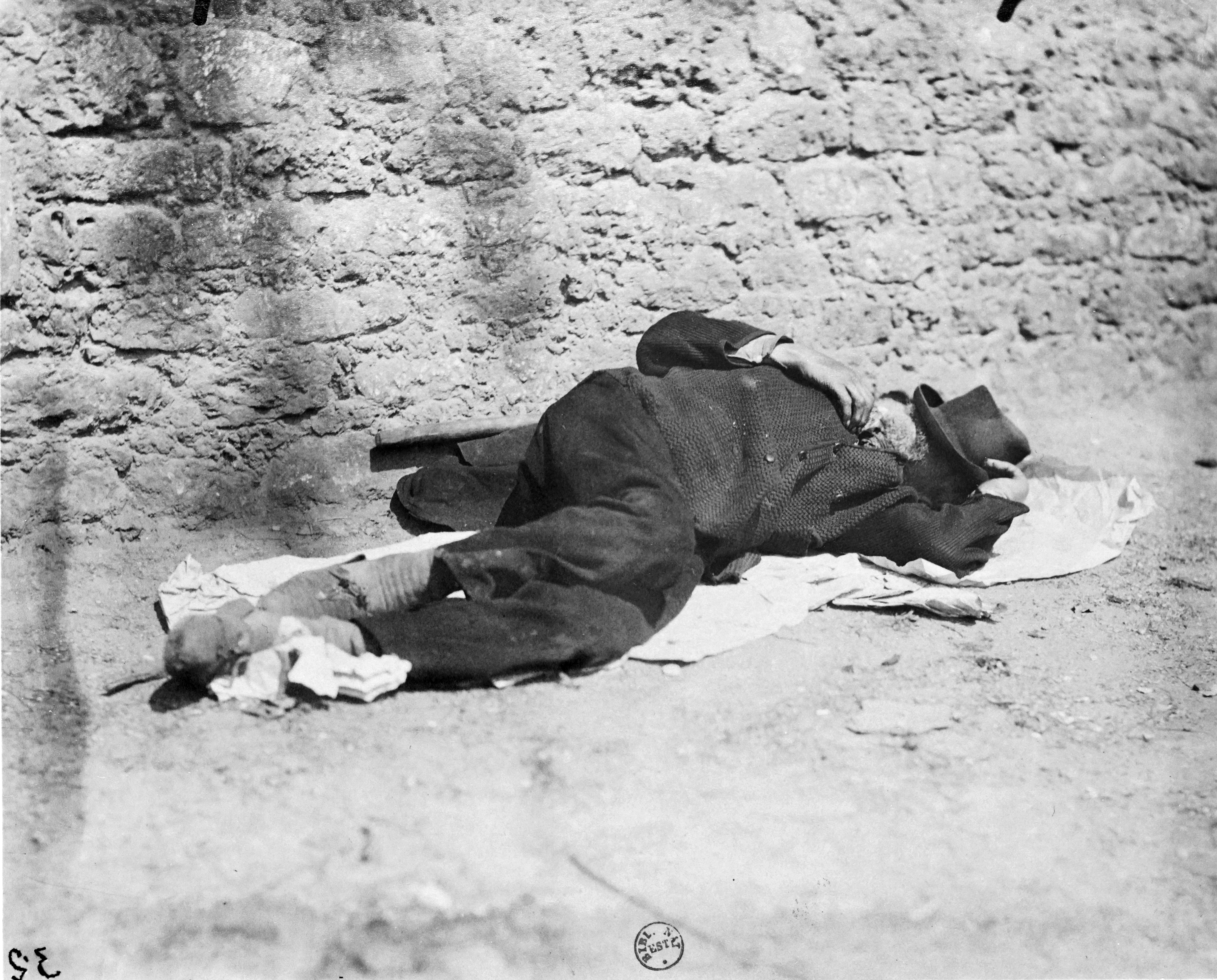 Tulák